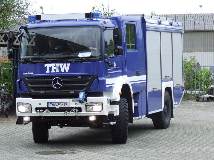 Der neue GKW1 des Ortsverband Radolfzell Mercedes Benz Axor 1829